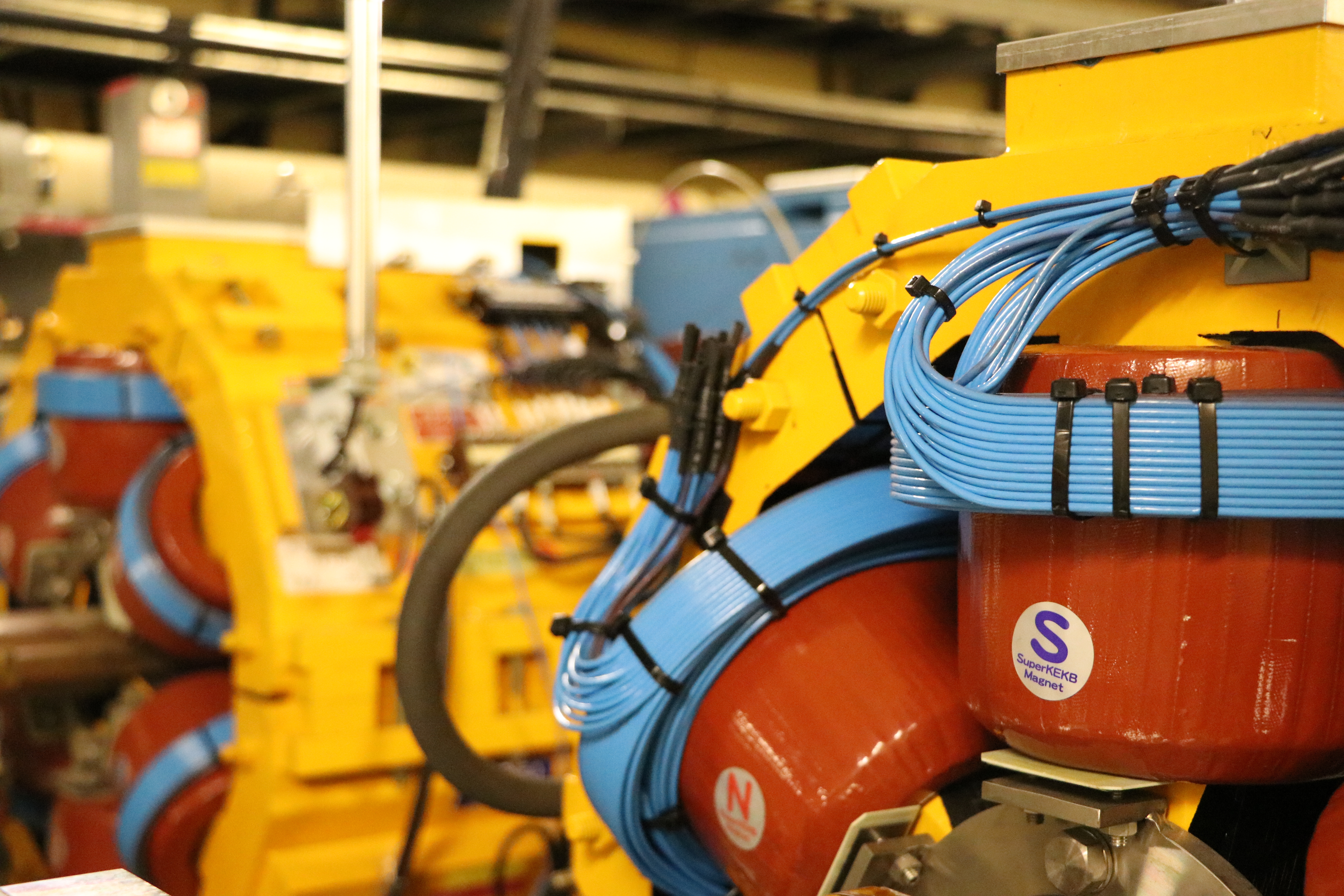 高エネルギー加速器研究機構内にあるSuperKEKBの一部である六極電磁石。KEK一般公開2019にて撮影。